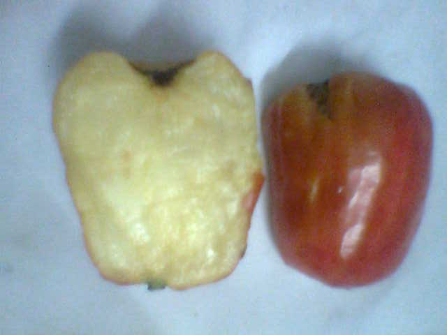 முந்திரிப் பழம்